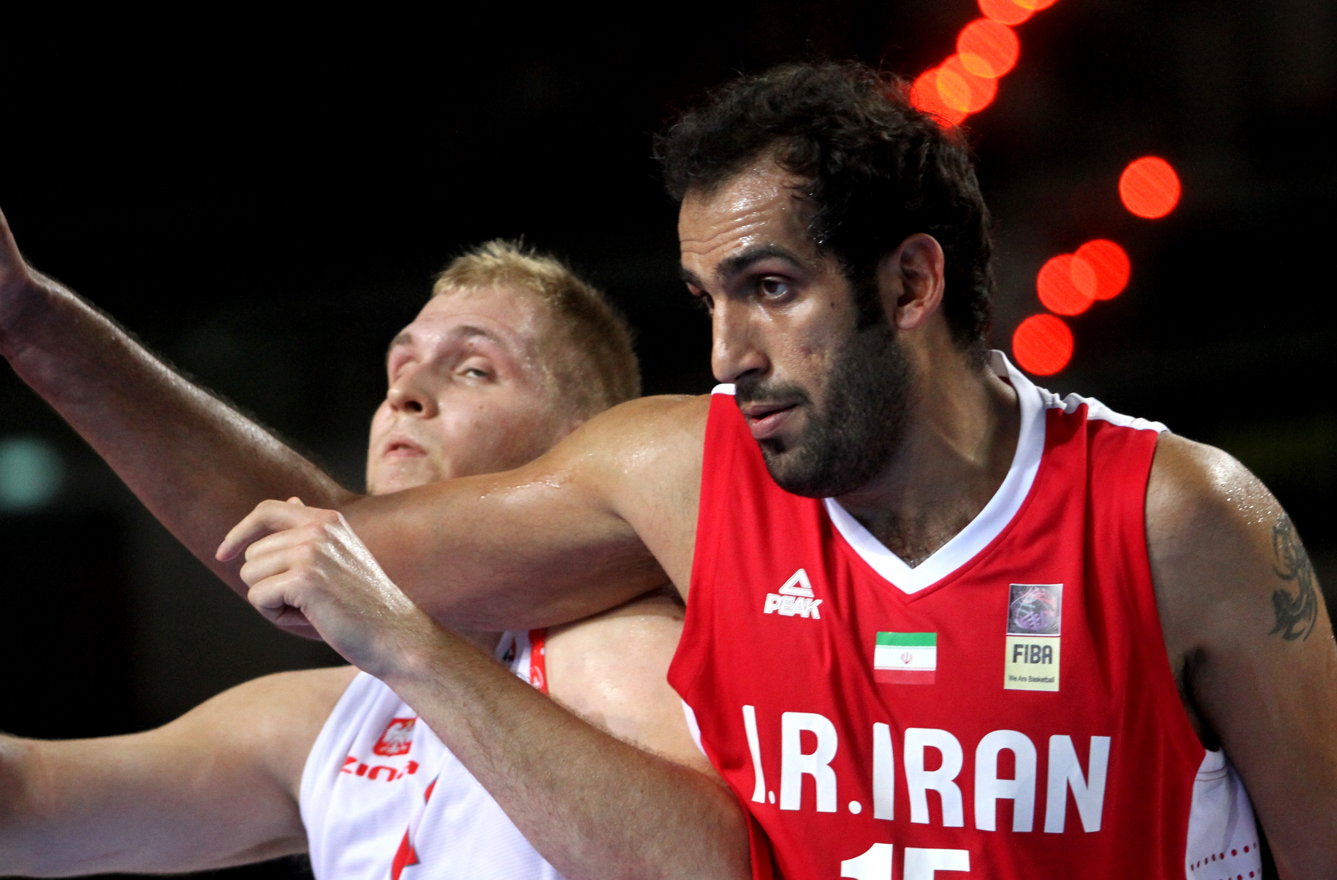 Toruń Basket Cup: Polska - Iran, 3 sierpnia 2014.